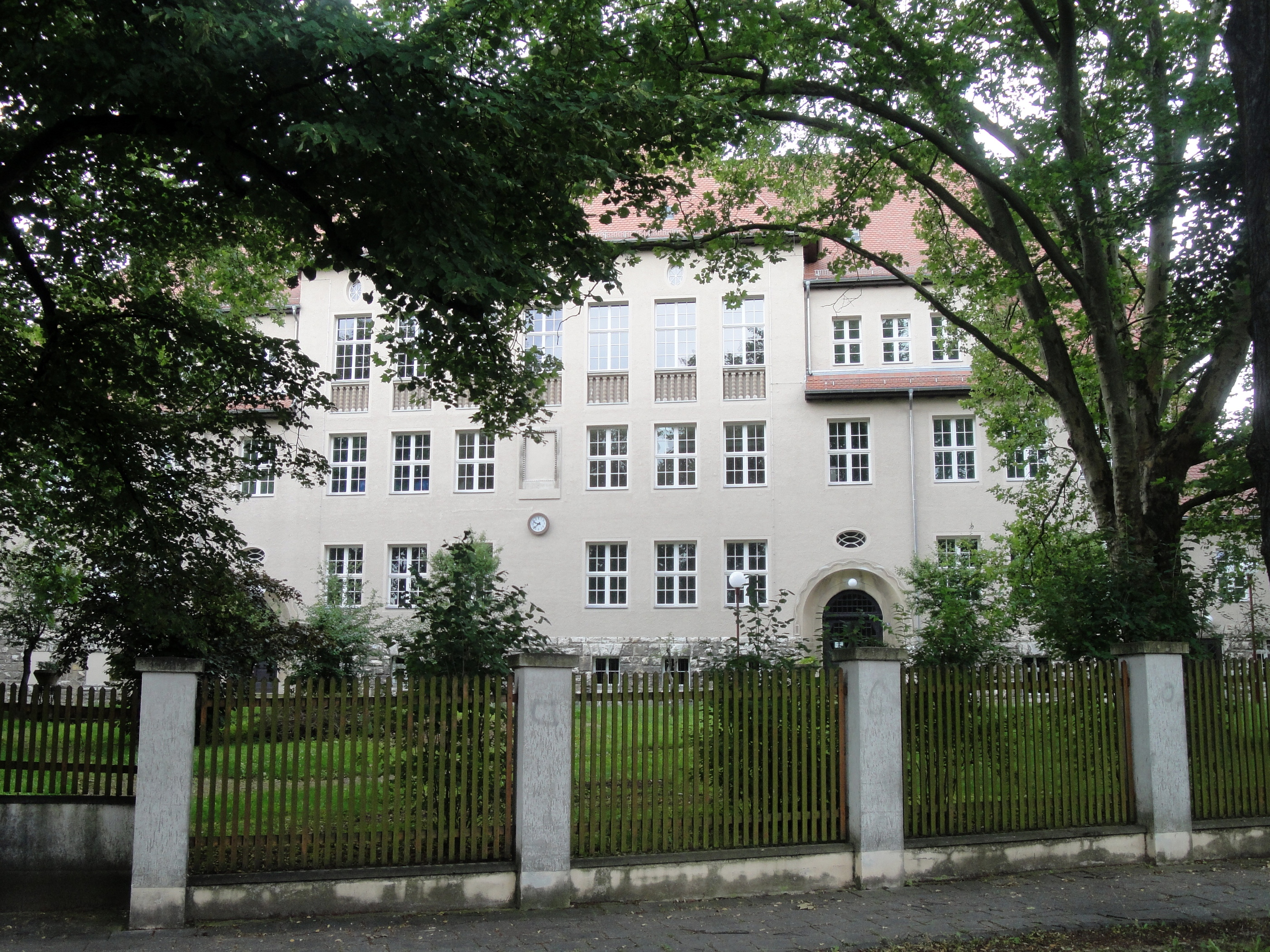 Volkshochschule Burgenlandkreis, Kreismusikschule, Naumburg (Saale)